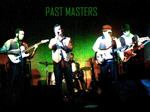 Past Masters Musicus Grex